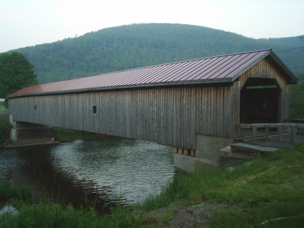 M3367S-4504